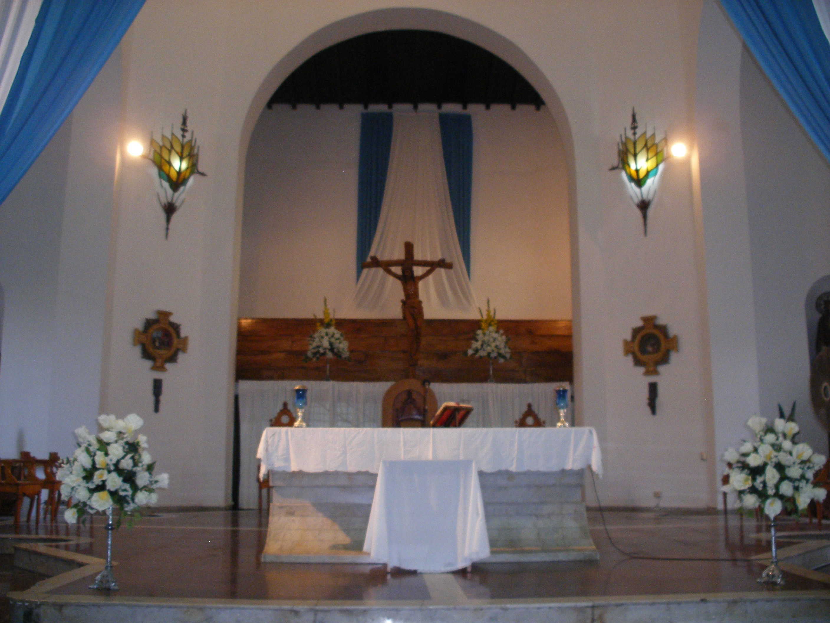 Vista del Presbiterio de la Catedral Metropolitana de Maracaibo, durante la Novena de Ntra. Sra. de Chiquinquirá, el 8 de noviembre de 2009.